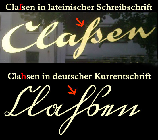 Claßen (mit Lang- und Rund-s) in lateinischer Schreibschrift und Clahsen (mit h und Rund-s) in deutscher Kurrentschrift. Normalerweise müsste man Clahsen in der deutschen Kurrentschrift mit langem s schreiben, hier soll es aber um die exakte Gegenüberstellung der Buchstaben gehen. Genauer um die Verwechslungsmöglichkeit des kurrenten h mit dem langem s der kursiven Lateinschrift. In der deutschen Kurrentschrift hätte man Claßen geschrieben und nicht Claſsen als Ersatz für ß, welches damals in der lateinischen Kursive nicht zur Verfügung stand